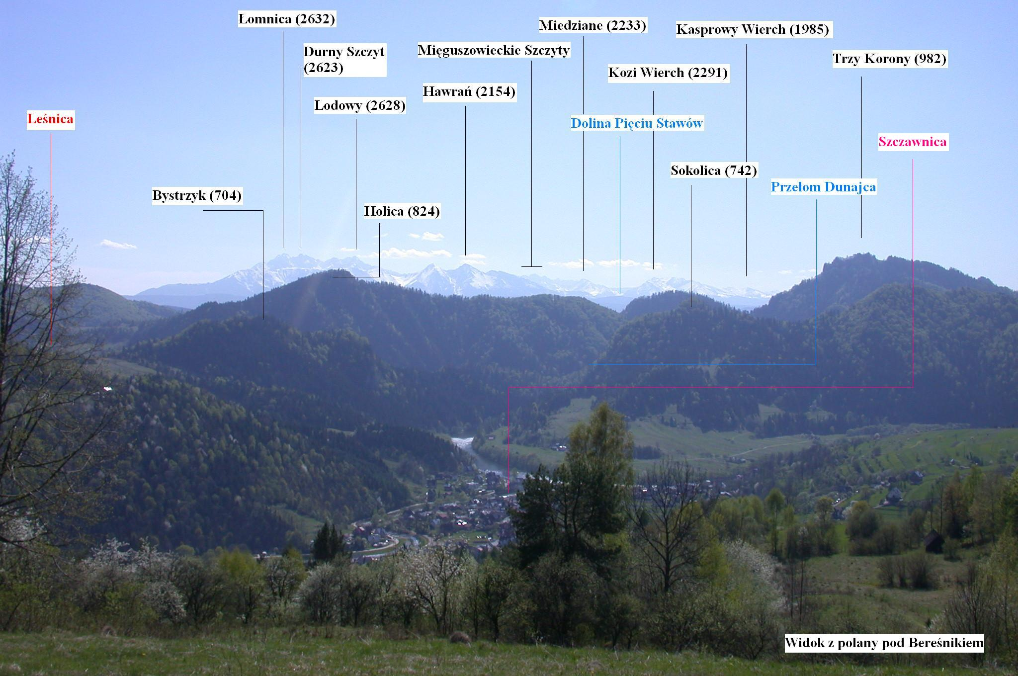 Panorama z polany pod Bereśnikiem.